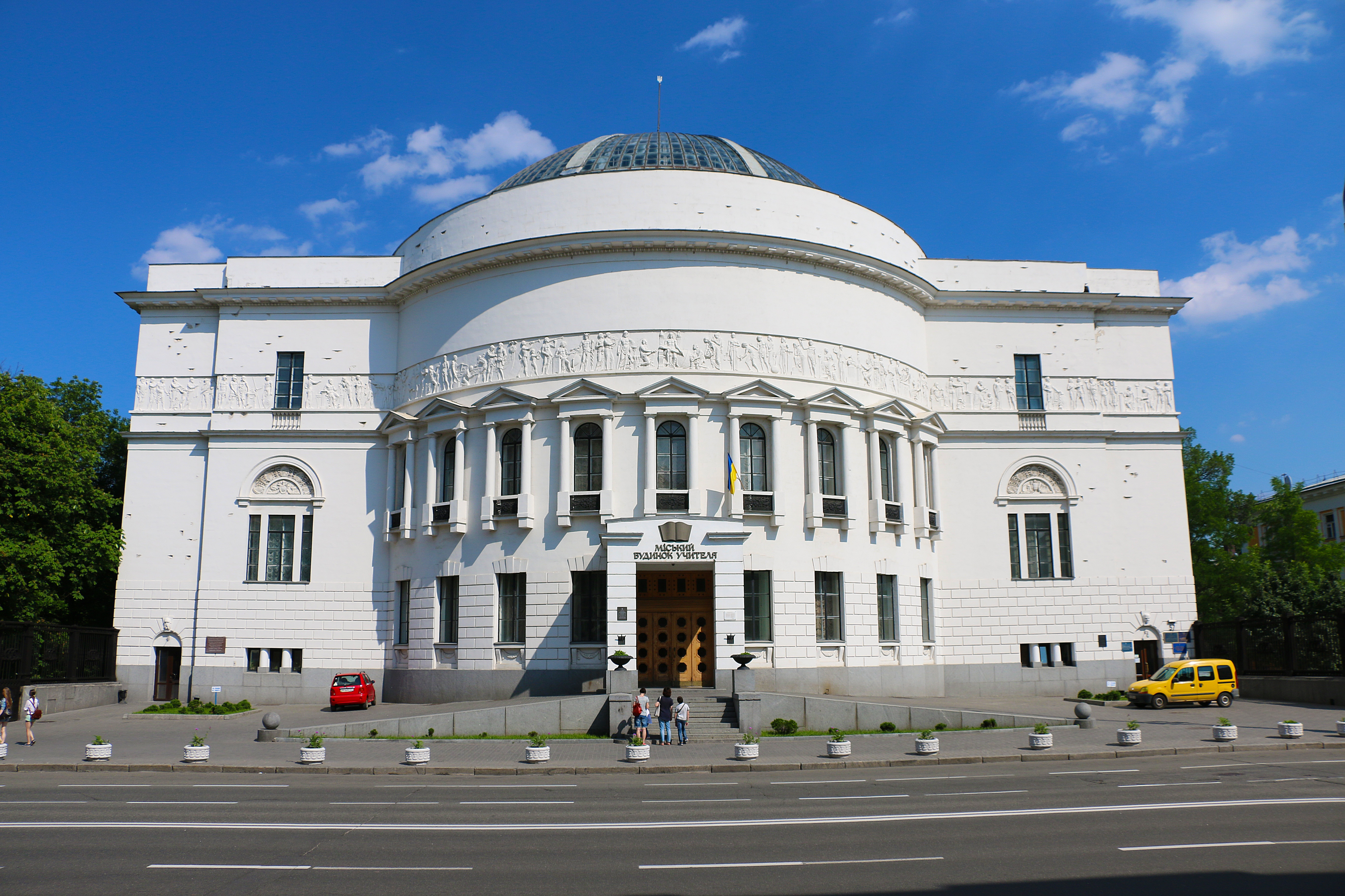 Будинок Педагогічного музею, в якому у 1913–1915 рр. містилося Київське товариство охорони пам'яток мистецтва і старовини, музей товариства; у 1916–1917 рр. — Київська школа льотчиків-спостерігачів; у 1918 р. відбувалися засідання Центральної Ради, Київ, Володимирська вул., 57